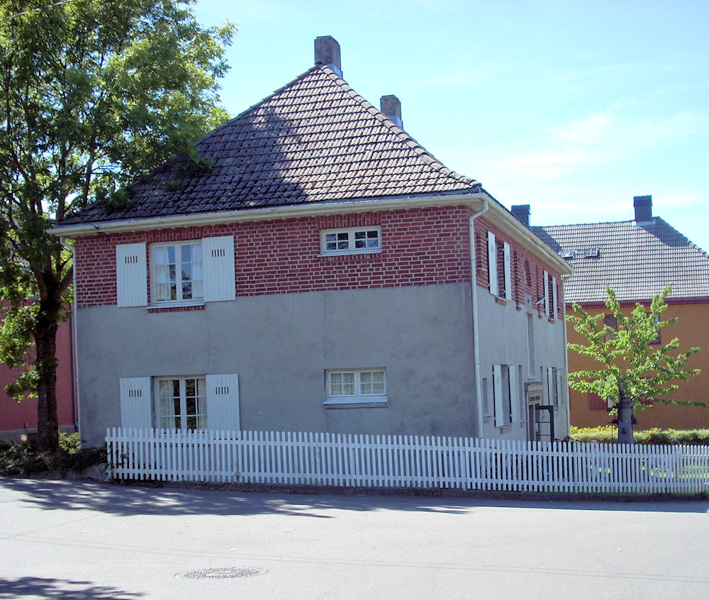 Eydehavnmuseet er et industrimuseum på Eydehavn, Arendal kommune, Aust-Agder, Norge